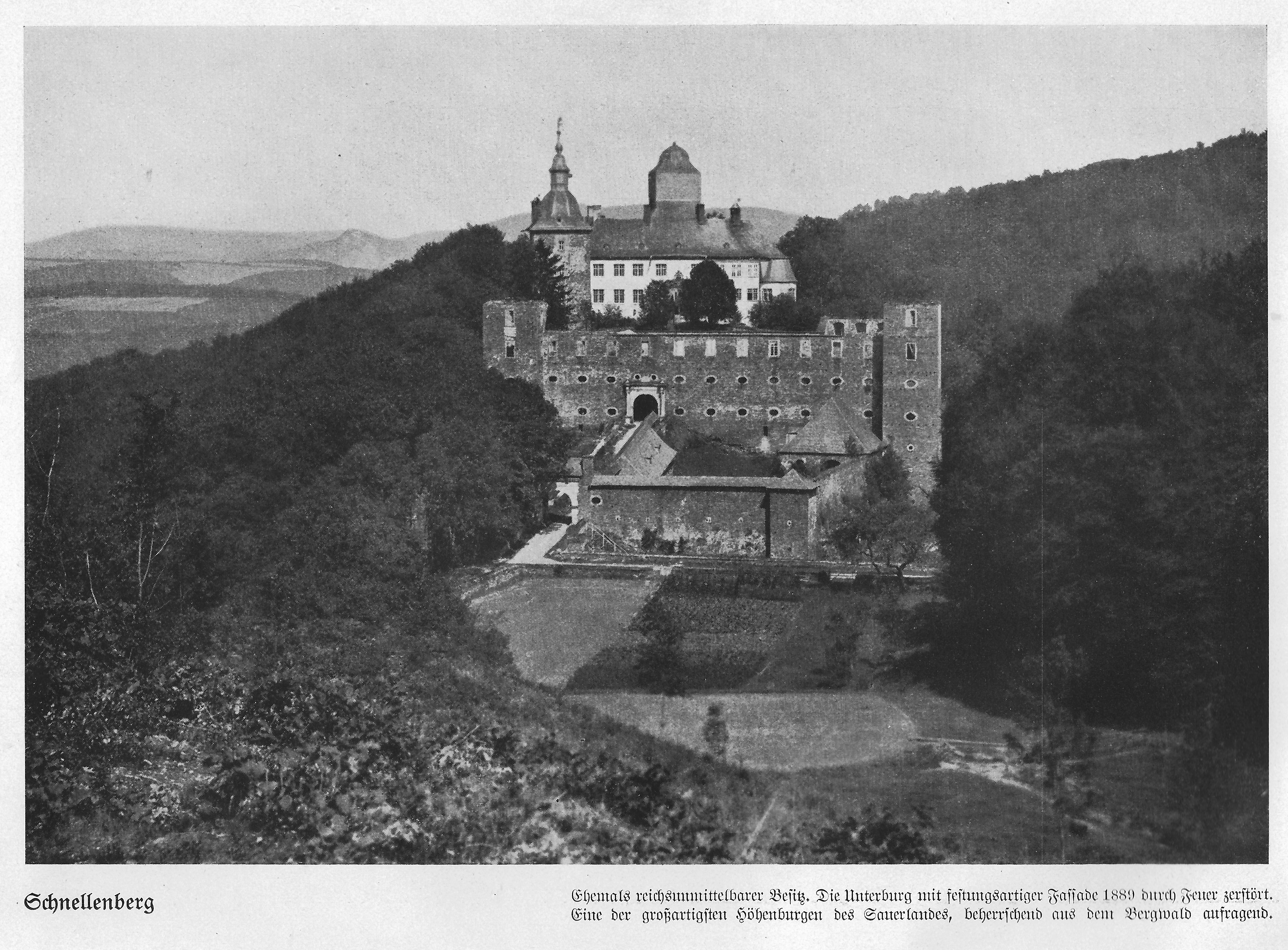 Bildband Westfahlen / erschienen 1941 bei Velhagen & Klasing / Bielefeld und Leipzig